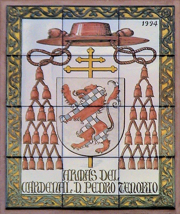 Escudo de armas del arzobispo de Toledo Pedro Tenorio (1377-1399). Localizado en la calle del Cardenal Tenorio en Alcalá de Henares (Comunidad de Madrid - España). Azulejo fabricado en 1994.